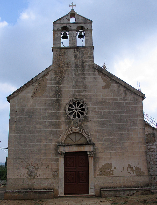 Crkva sv. Nikole, Stari Grad, Hvar